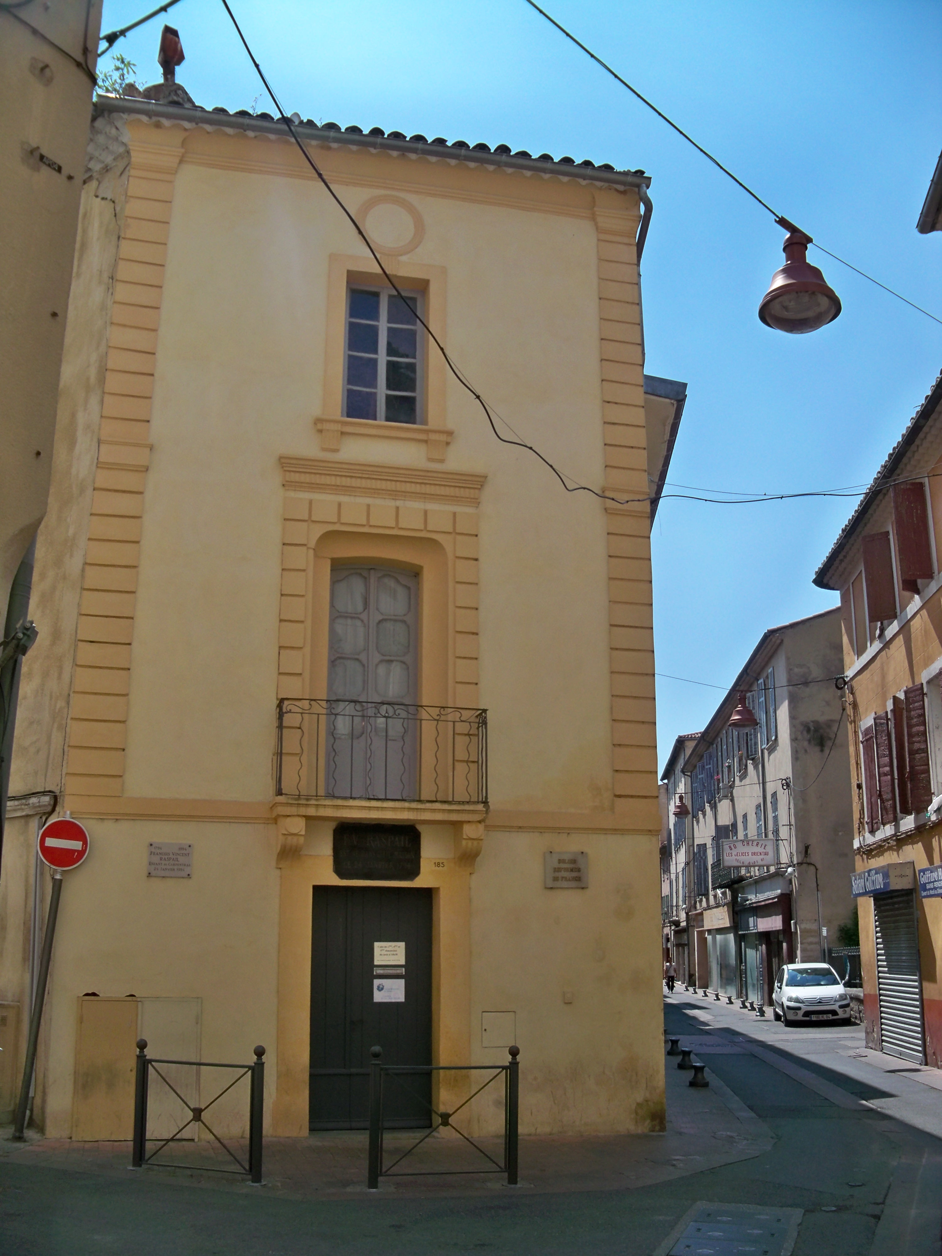 Maison natale de François Vincent Raspail, à Carpentras, Vaucluse, France